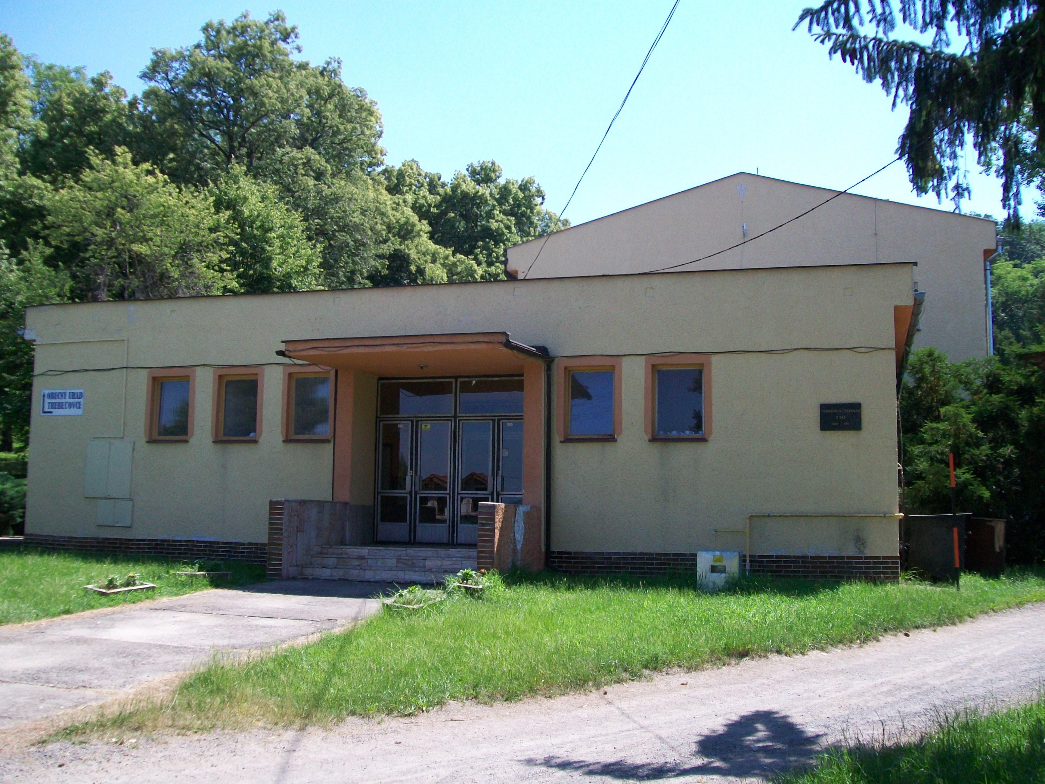 Obecný úrad v Trebeľovciach